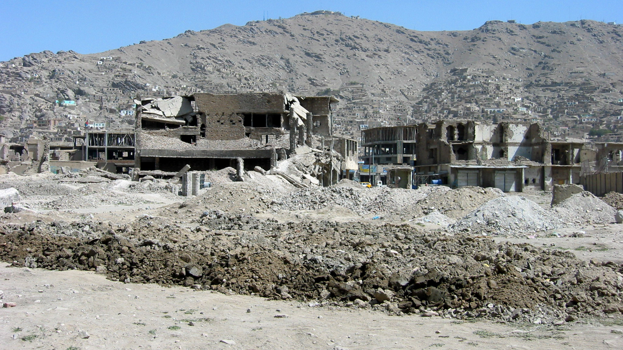 Im Bürgerkrieg zerstörte Häuser in Kabul